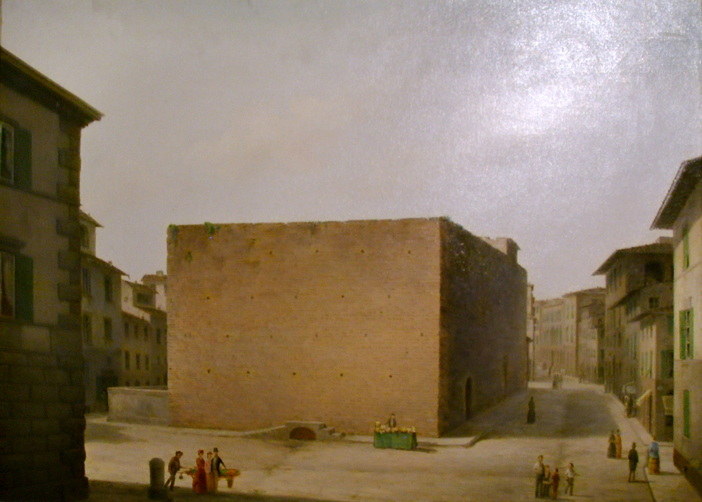 Il dipinto ritrae lo storico carcere di Firenze come si presentava nel XIX secolo, poco prima della sua demolizione. Attualmente ne resta il ricordo unicamente nel nome del "Canto delle Stinche".